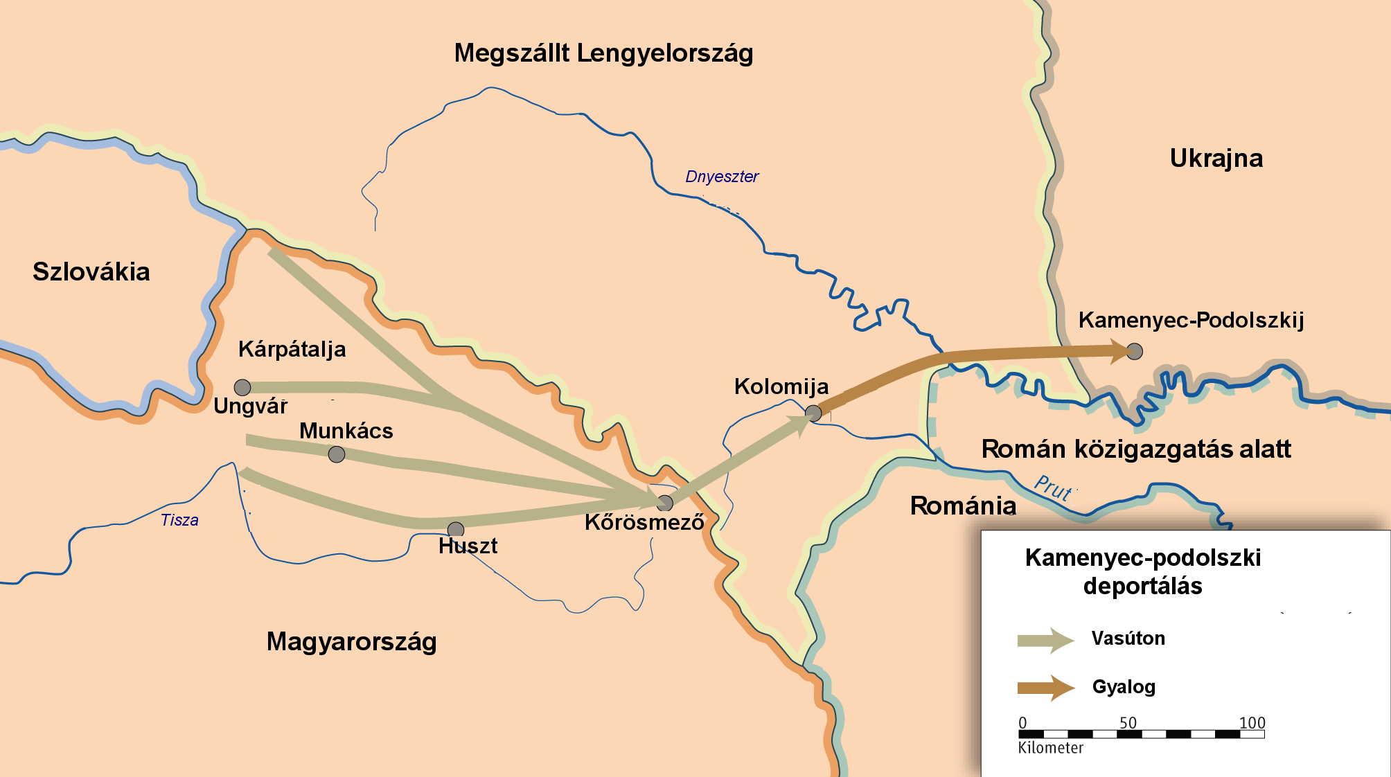 Az 1941-es kamenyec-podolszkiji deportálások